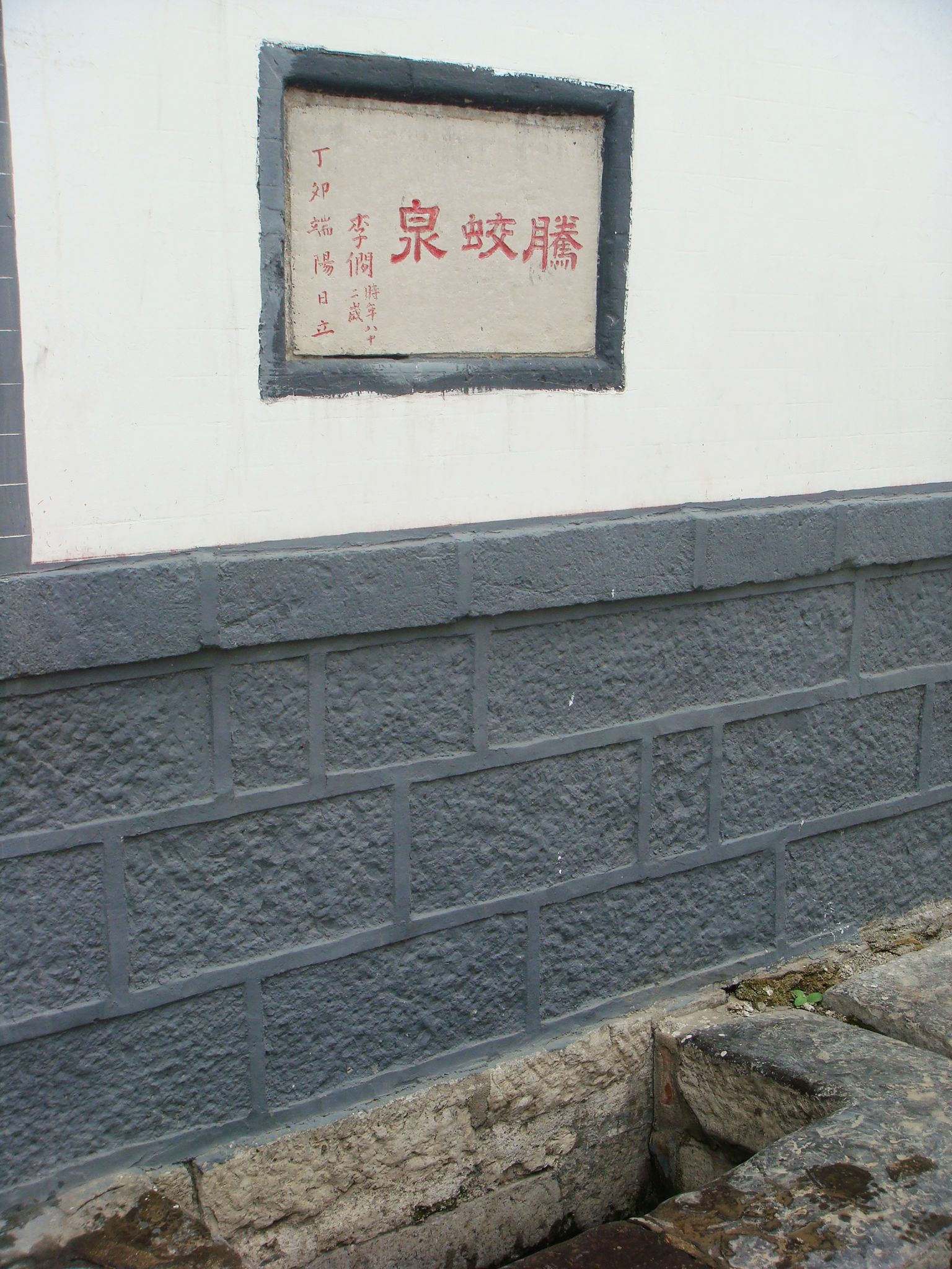 位于济南老城中的腾蛟泉。